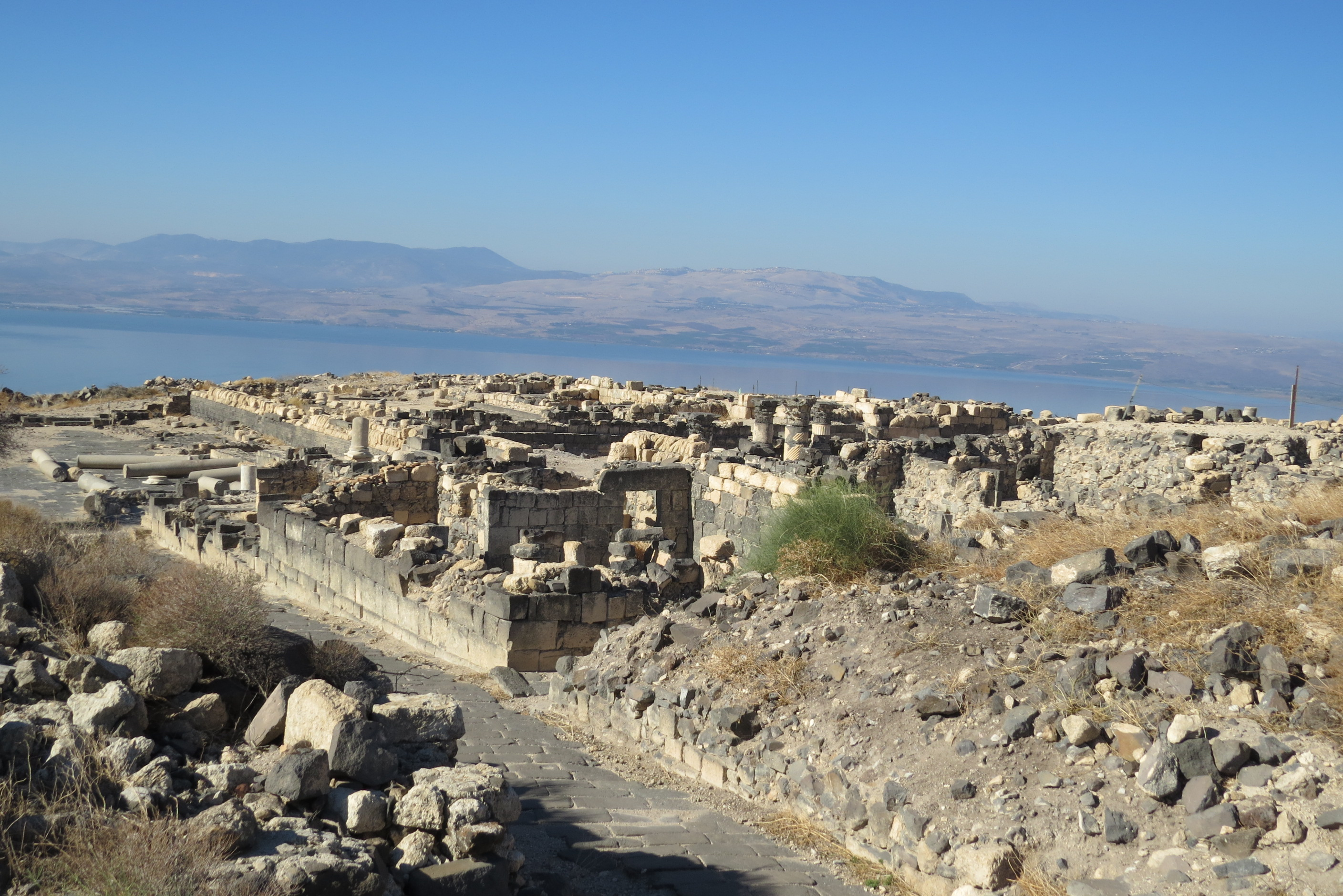 סוסיתא נוסדה כעיר מדינה (פוליס) ככל הנראה באמצע המאה ה-2 לפנה"ס בידי הממלכה הסלאוקית.